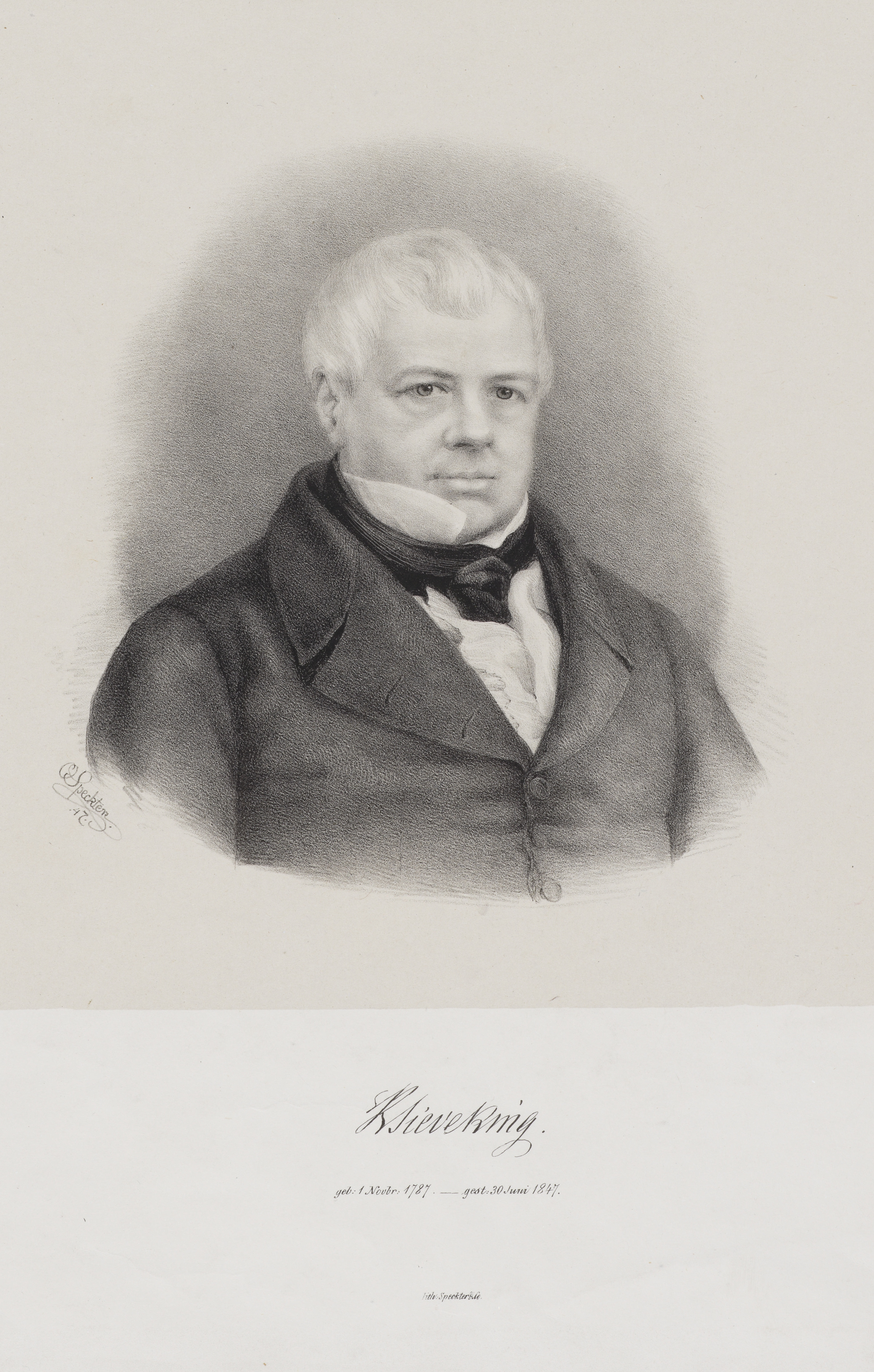 Bildnis von Karl Sieveking